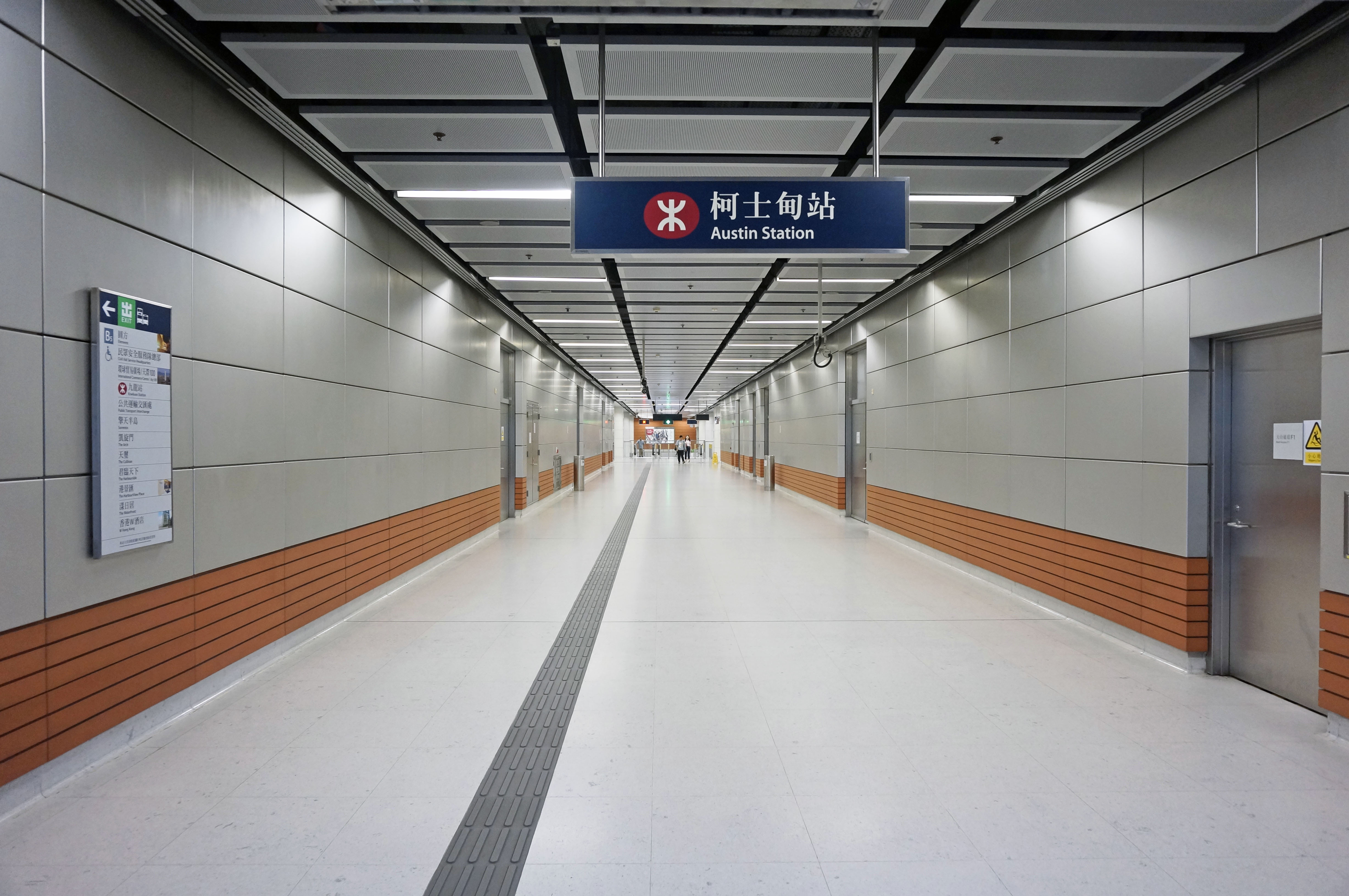 港鐵柯士甸站B5出入口